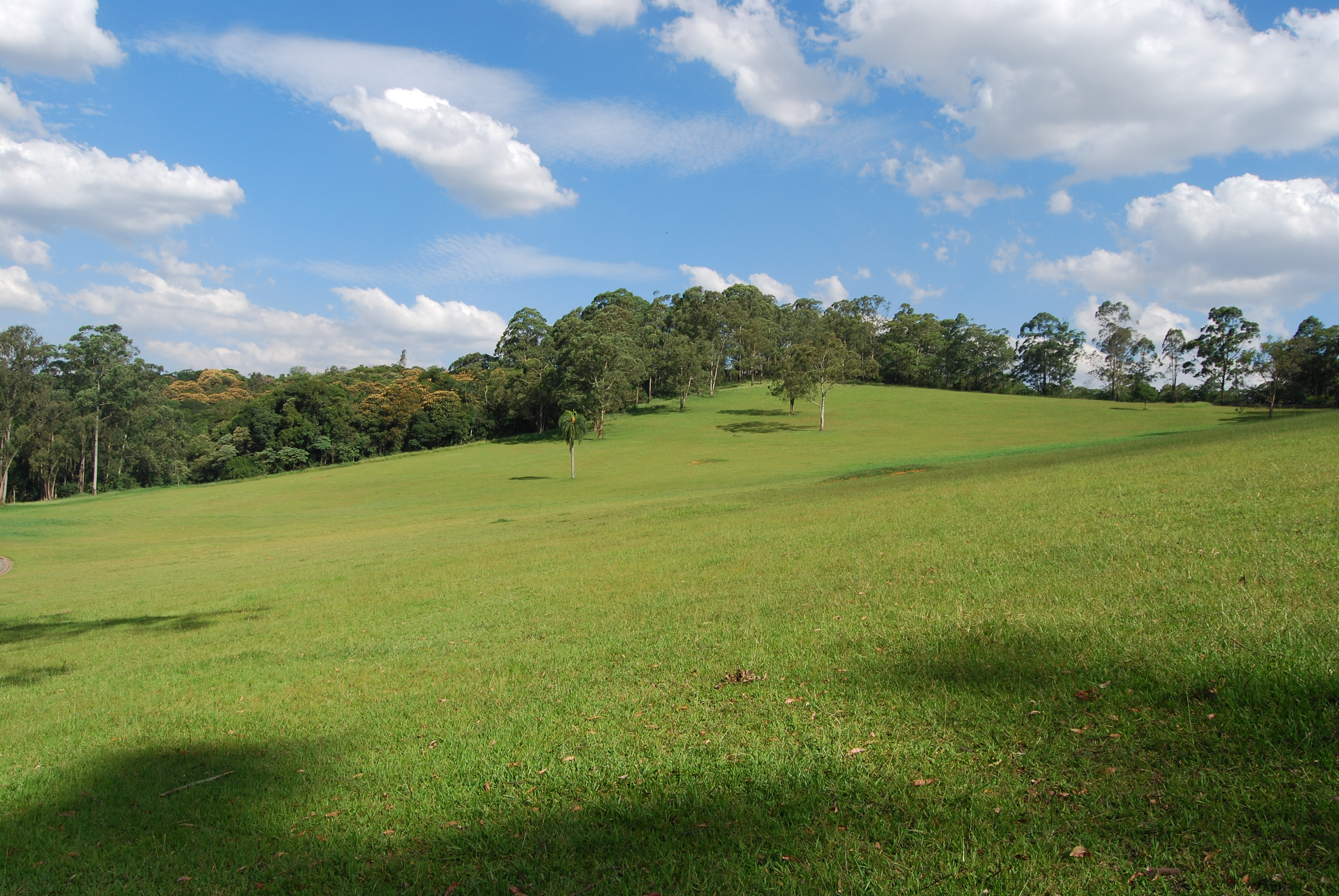 Parque do Carmo, Cidade de São Paulo, Brasil, em 04 de março de 2008. (Carmos' Park, Sao Paulo, Brazil, mars-4-2008)